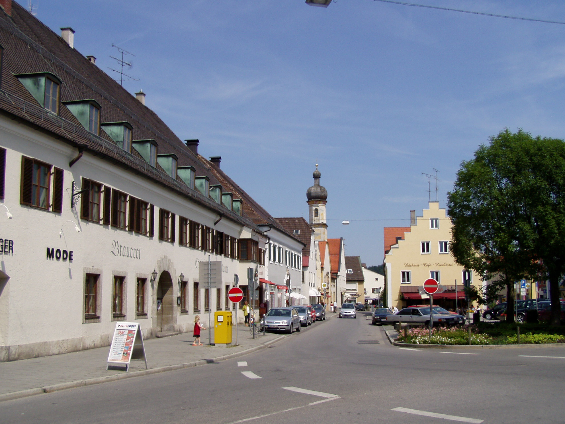 Marktplatz in Grafing von Westen